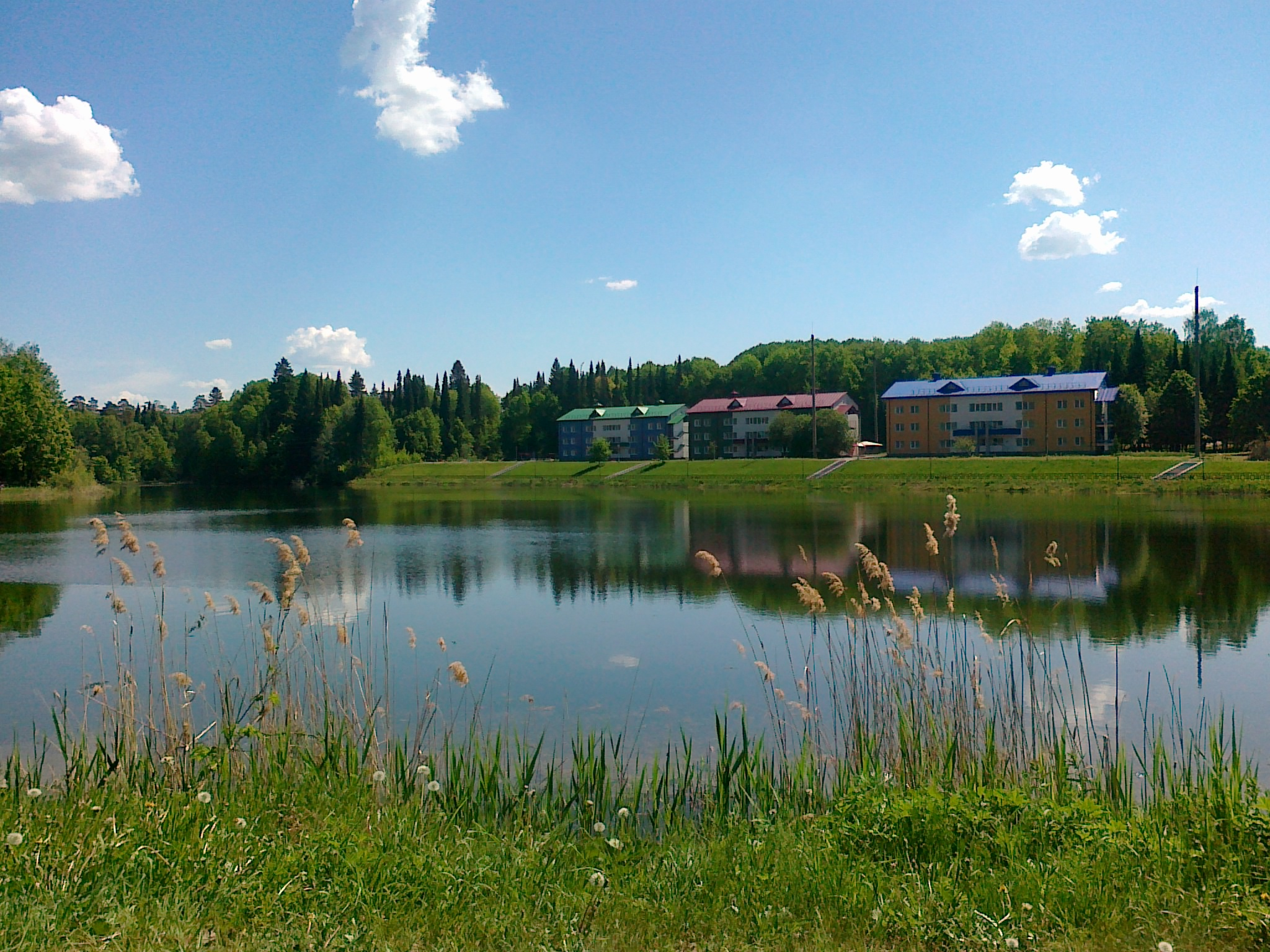 Детский Лагерь "Росинка"